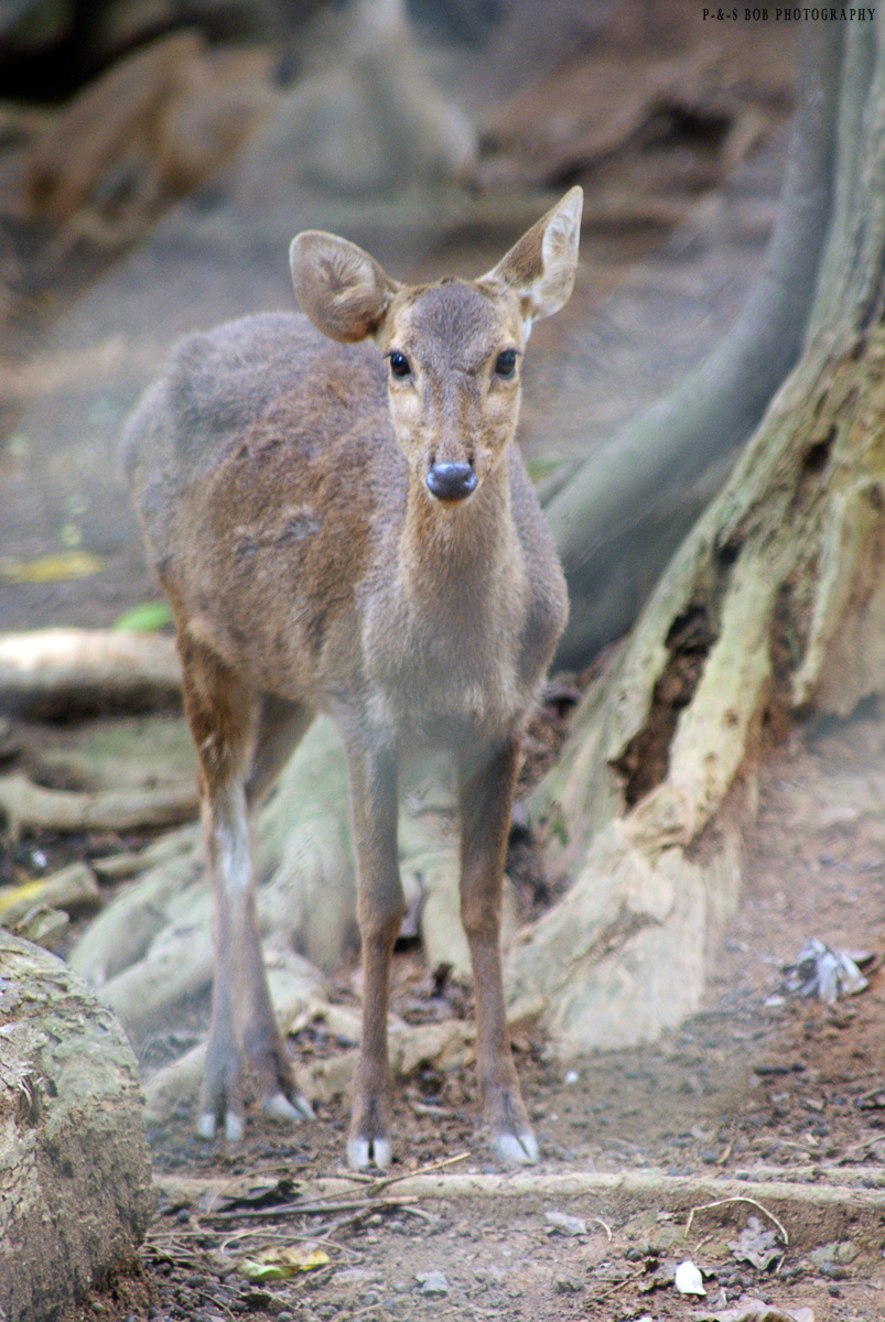 Rusa Bawean (in Malay) at Zoo Melaka, Malaysia.